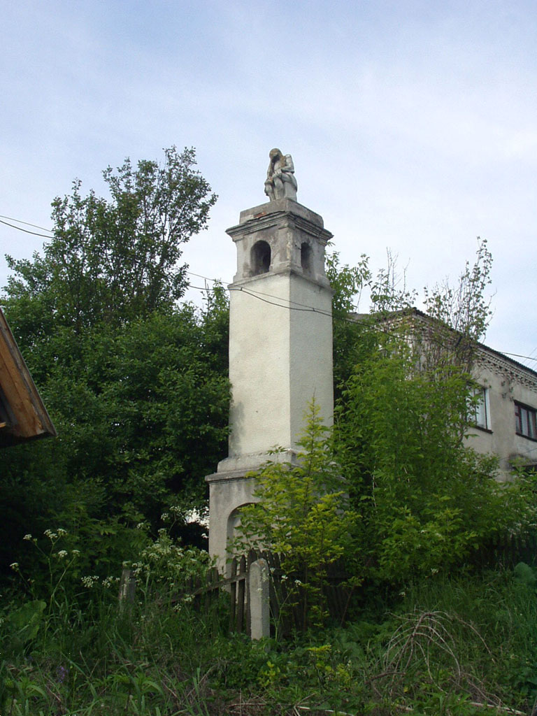 Скорботний Ісус (Сатанів)